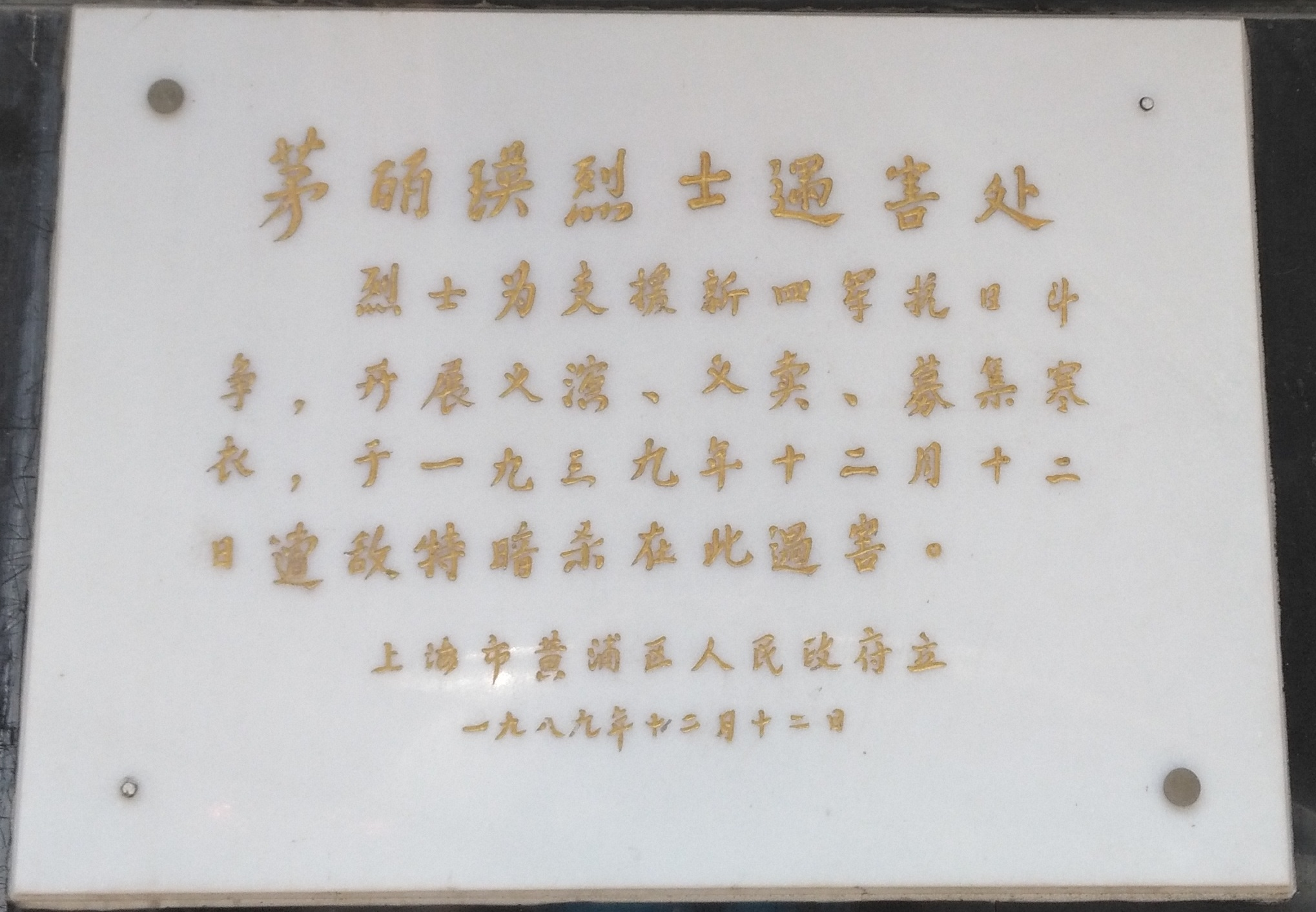 茅丽瑛烈士遇害处，此纪念碑由上海市黄浦区人民政府设立。 “ 茅丽瑛烈士遇害处烈士为支援新四军抗日斗争，开展义演、义卖、募集寒衣，于一九三九年十二月十二日遭敌特暗杀在此遇害。上海市黄浦区人民政府立一九八九年十二月十二日 ”